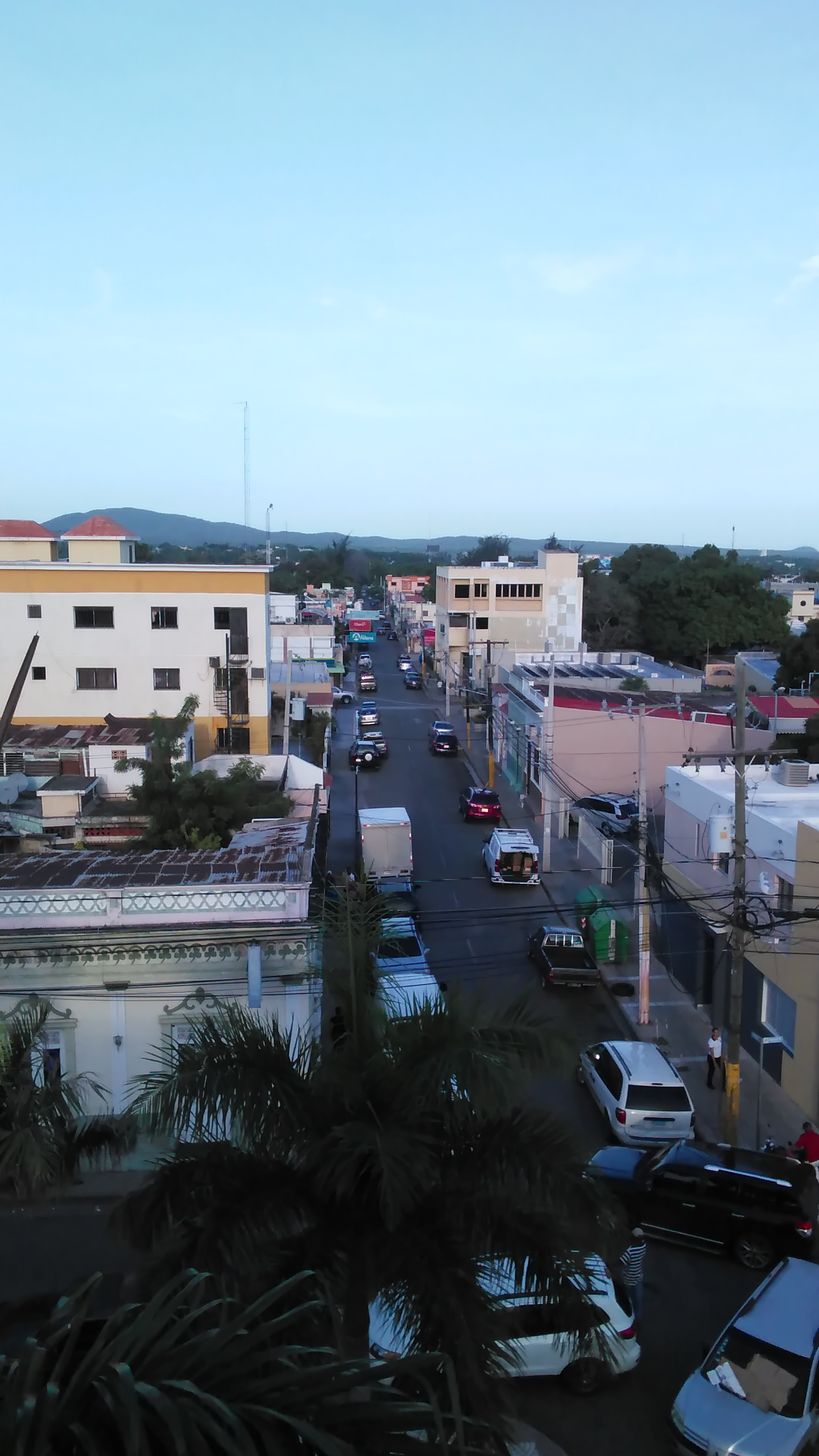 Zona Este de Baní